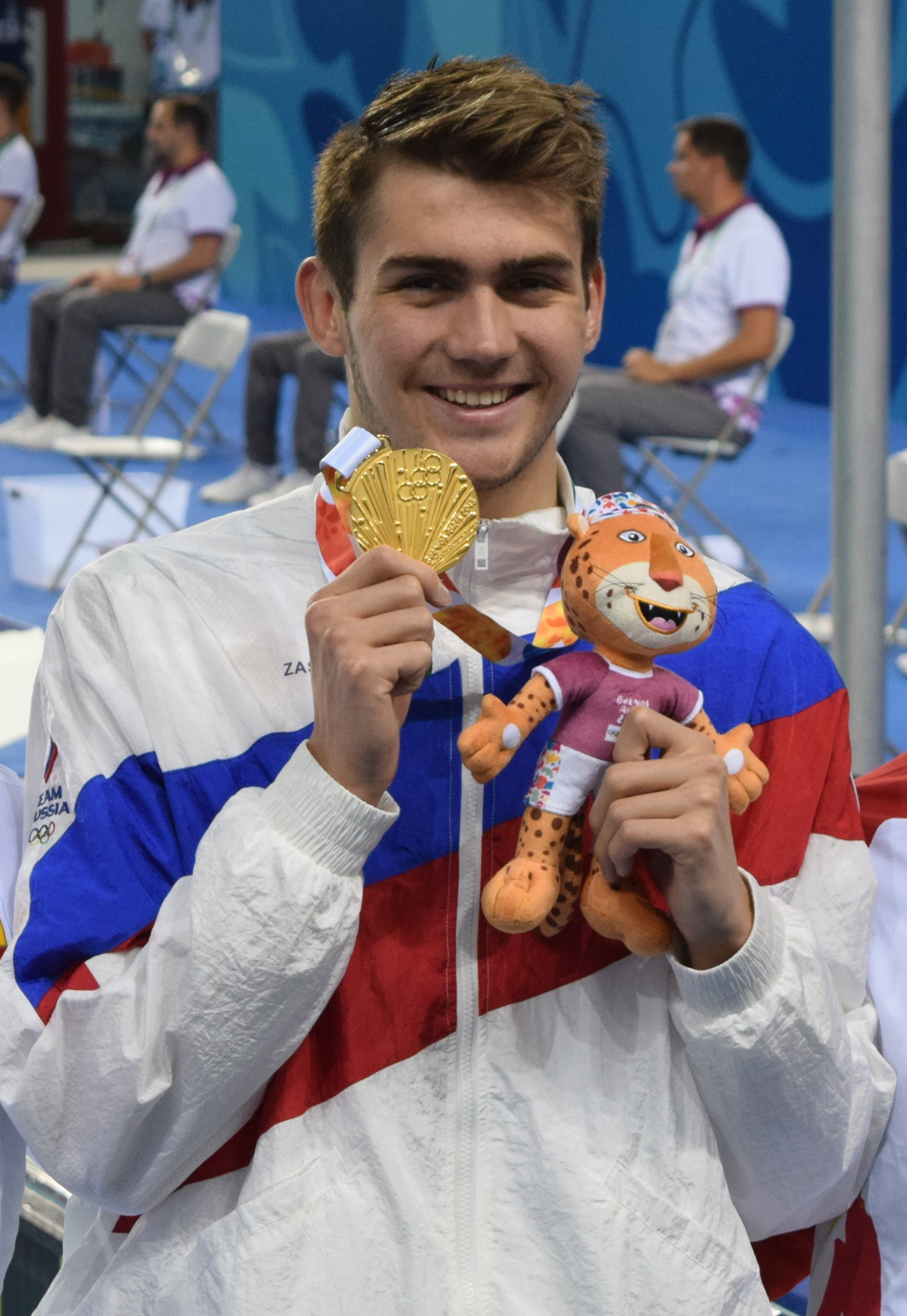 Finales de natación , durante los Juegos Olímpicos de la Juventud 2018 en Buenos Aires. Tarde del 10 de octubre. Kliment KOLESNIKOV, Daniel Cristian MARTIN y Manuel MARTOS BACARIZO.